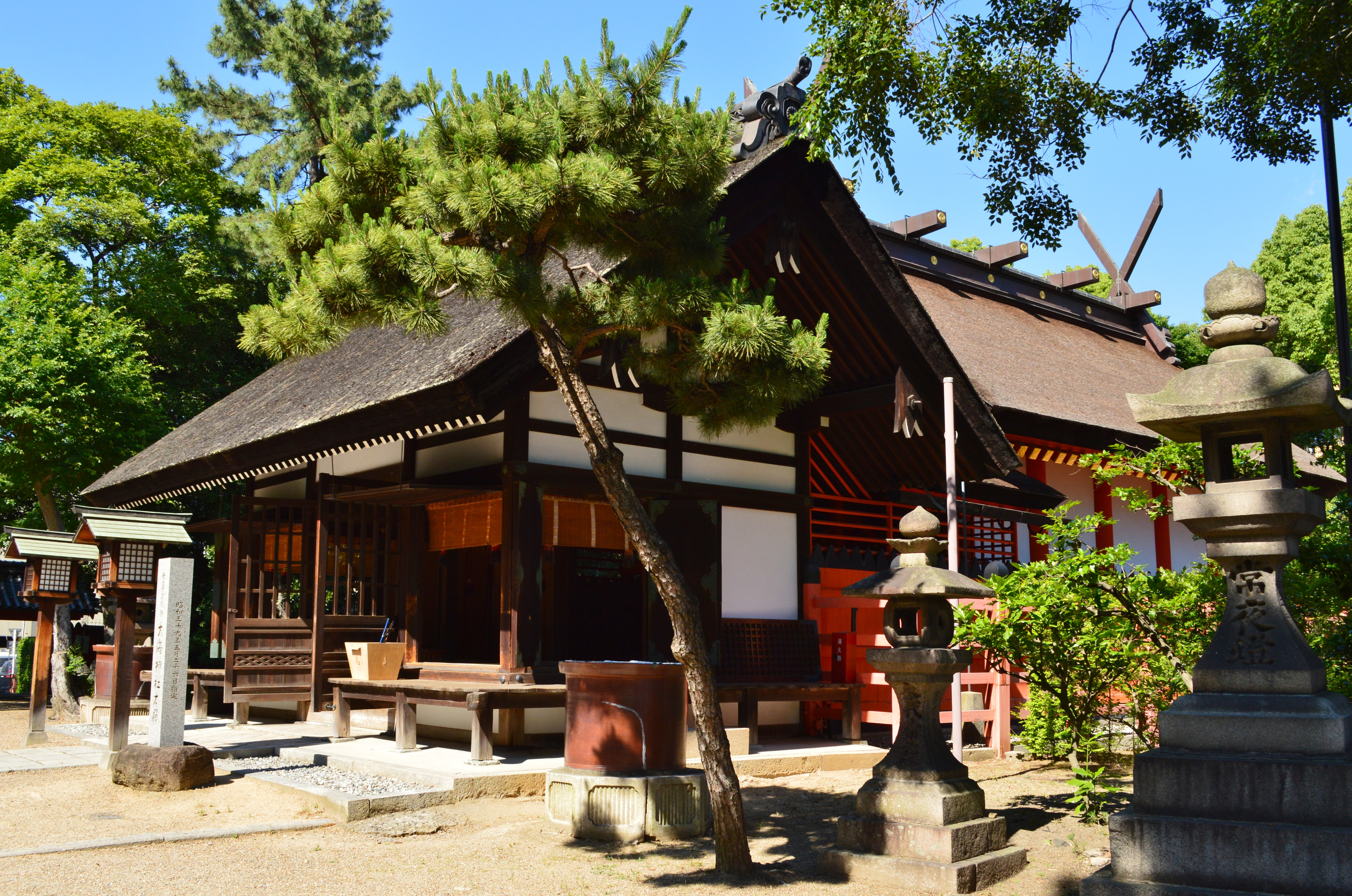 大海神社 (大阪市) 社殿